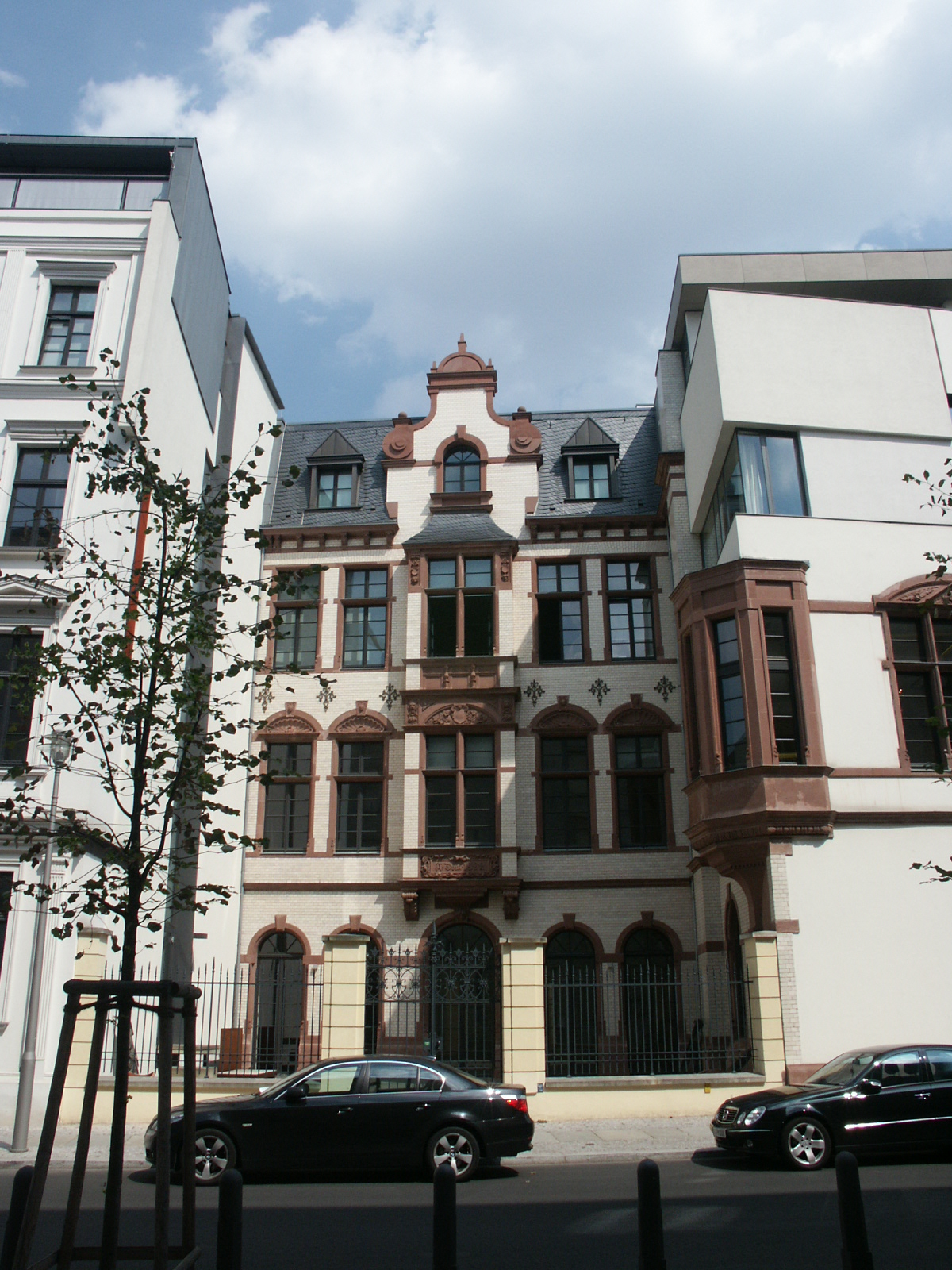 Mittelbau, Landesvertretung Hamburg in Berlin (2006)